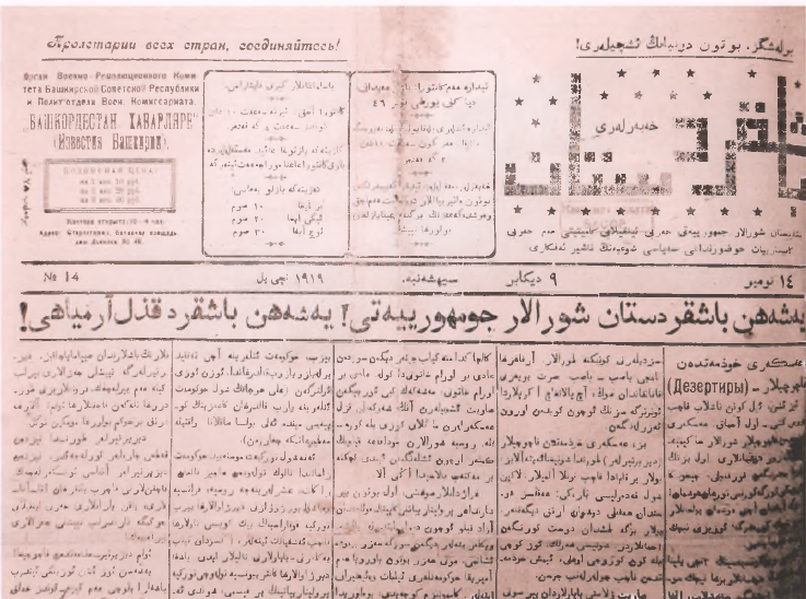 Вестник Башкурдистана